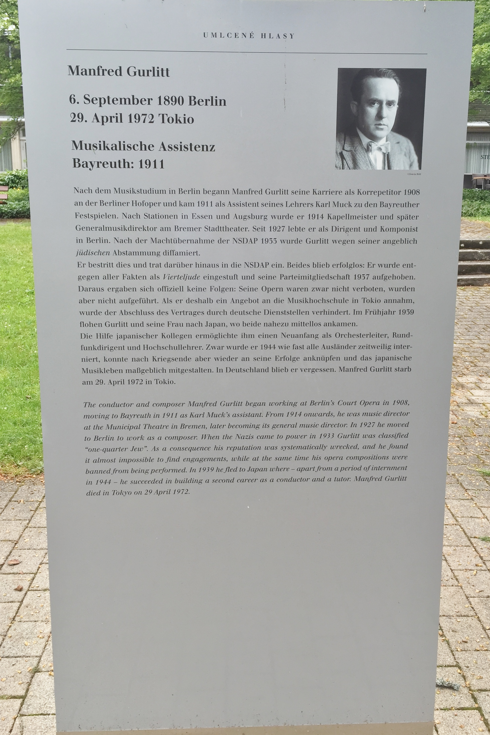 "Verstummte Stimmen - Die Bayreuther Festspiele und die 'Juden' 1876 bis 1945", Ausstellung 2016